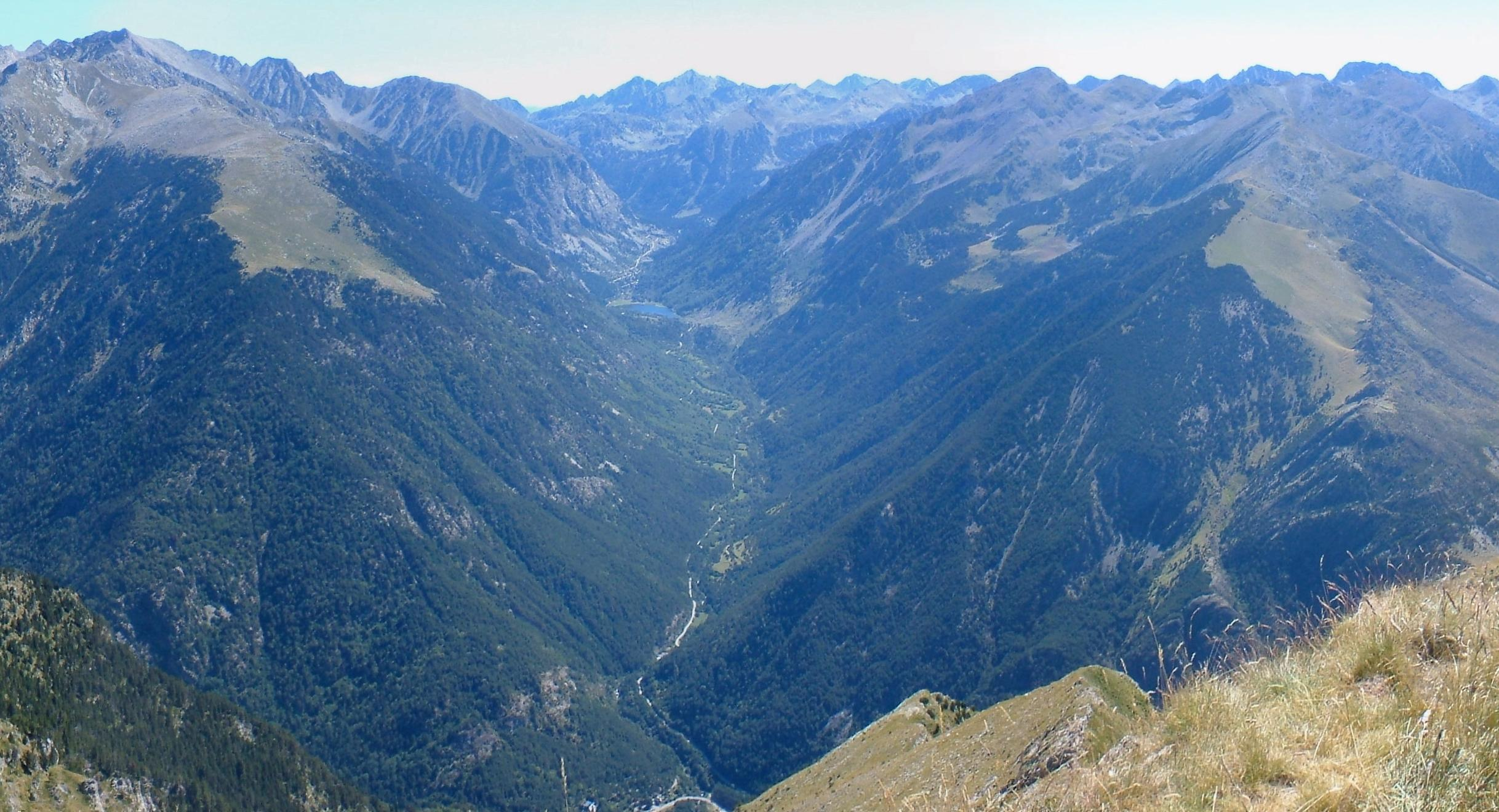 Vall de Sant Nicolau, vist des de l'Aüt; la Vall de Boí, Alta Ribagorça, Catalunya